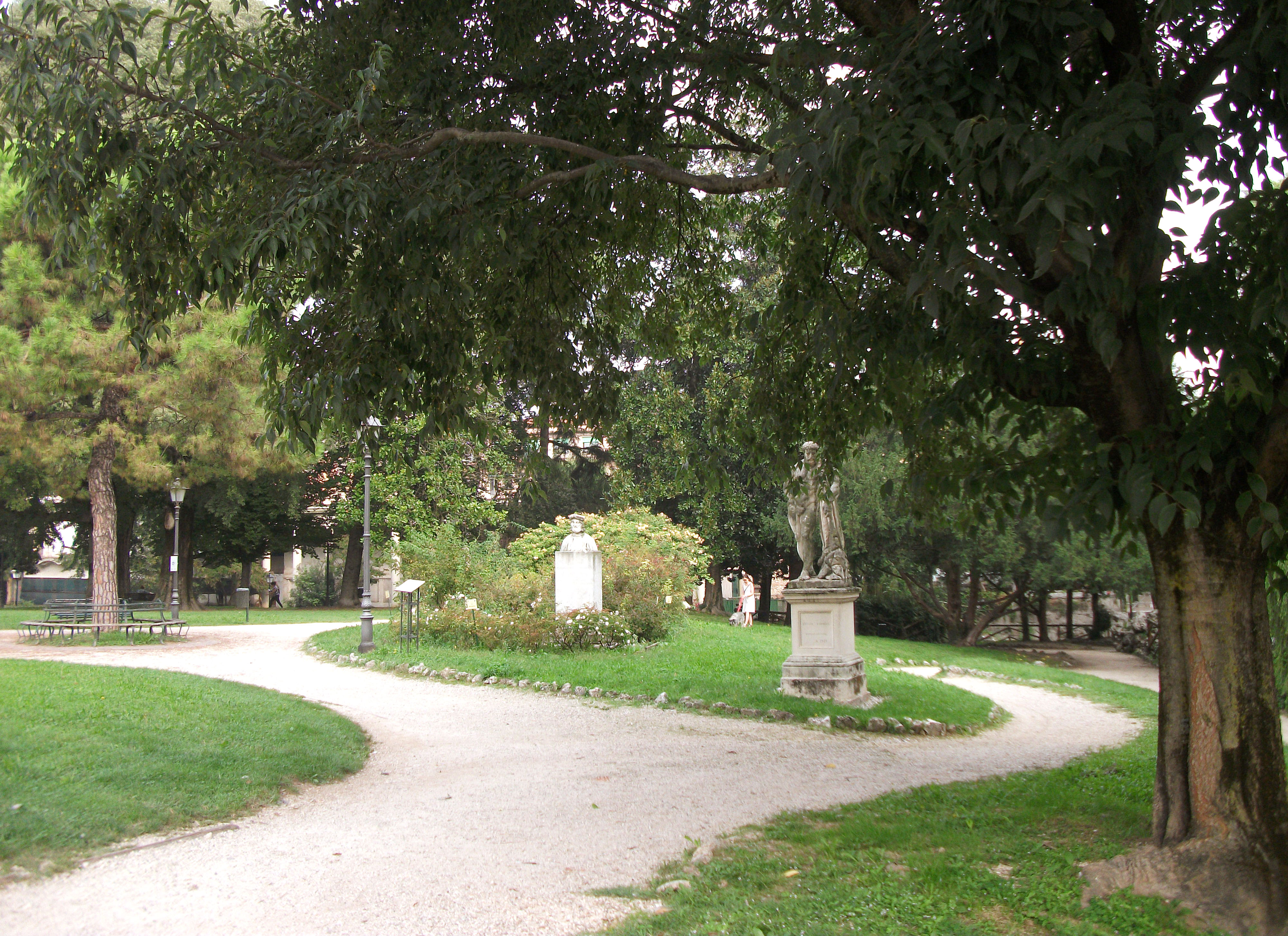 Giardini Salvi This is a photo of a monument which is part of cultural heritage of Italy.